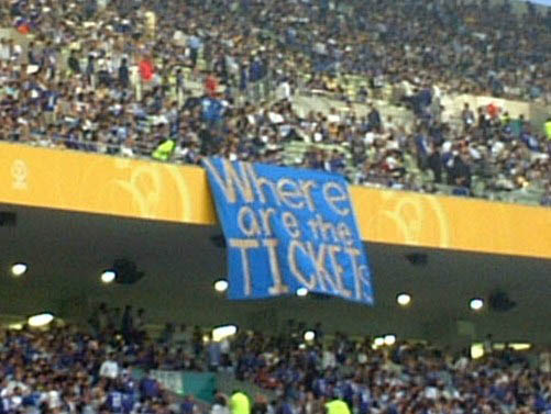 チケット問題を糾弾する弾幕。日本対ベルギー、埼玉スタジアムにて。 ファイルの説明)